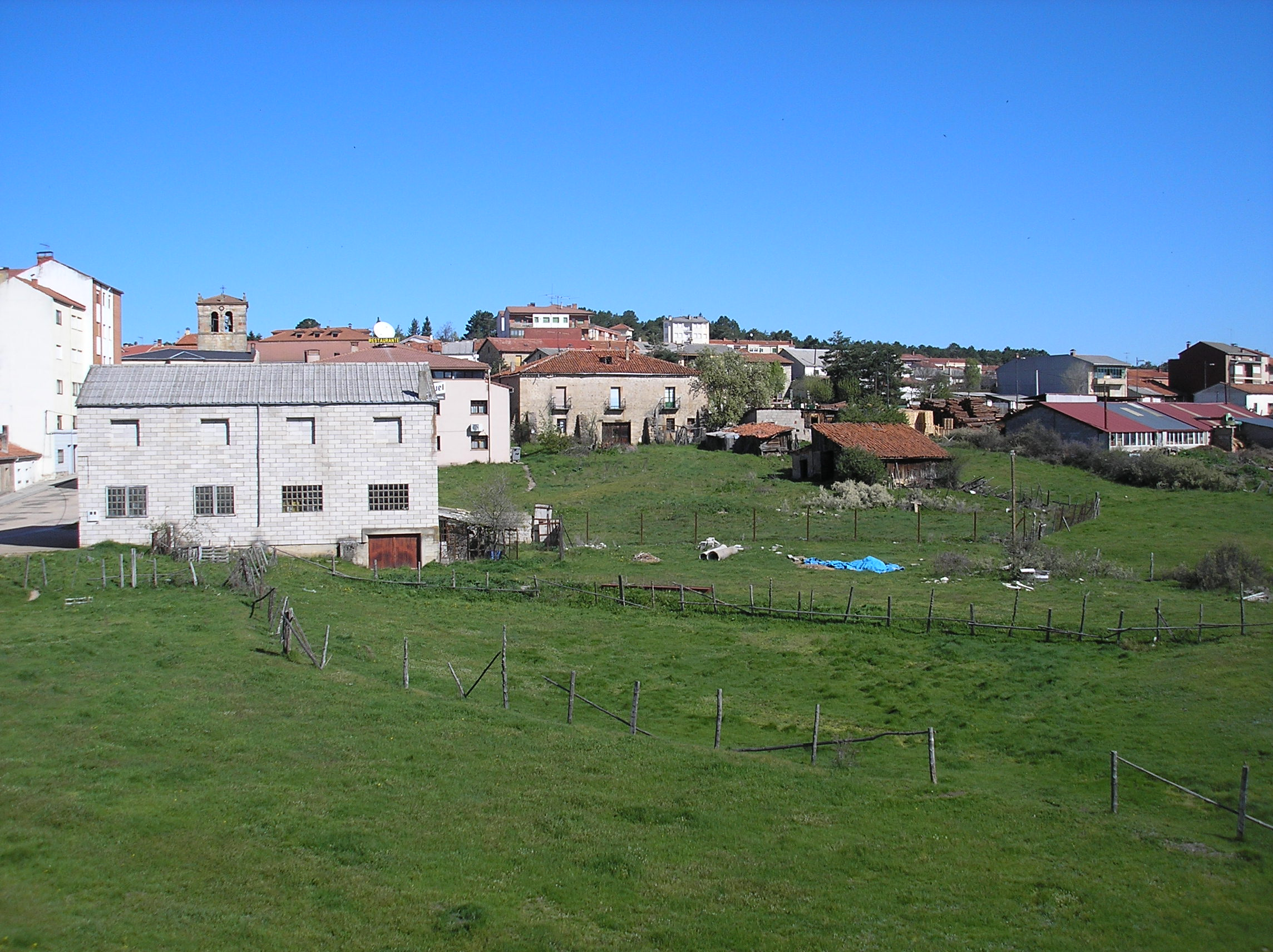 Navaleno, vista parcial desde la carretera